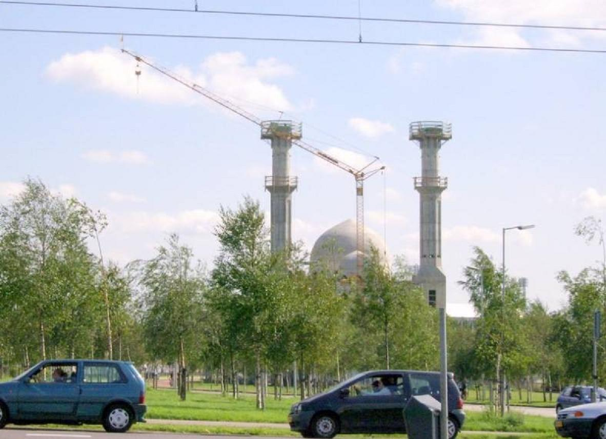 Bouw van de Essalam Moskee aan de Laantjesweg.